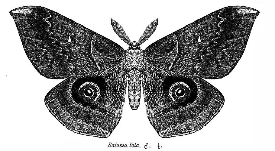 Male Salassa lola (Westwood, 1847)